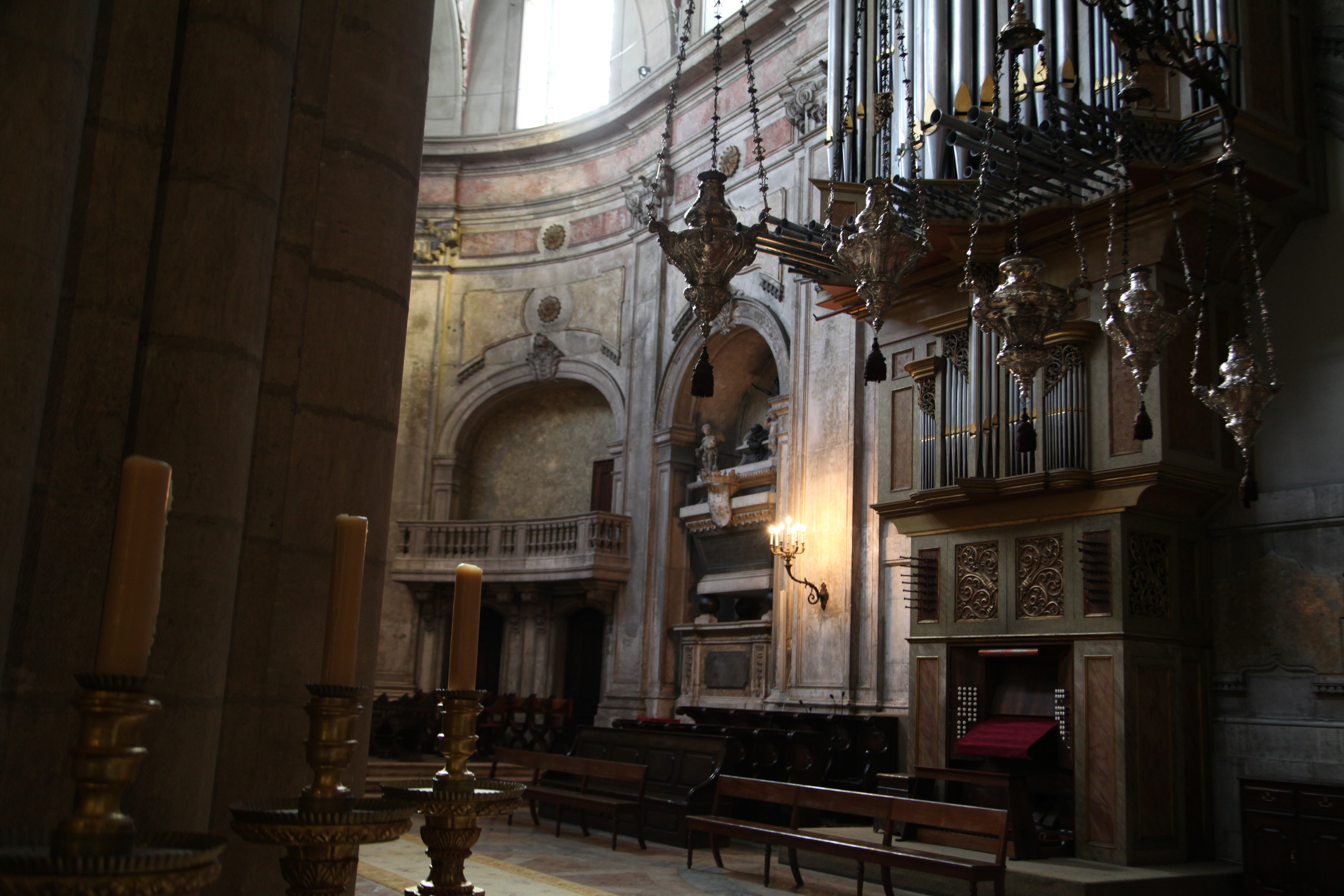 Lisbonne